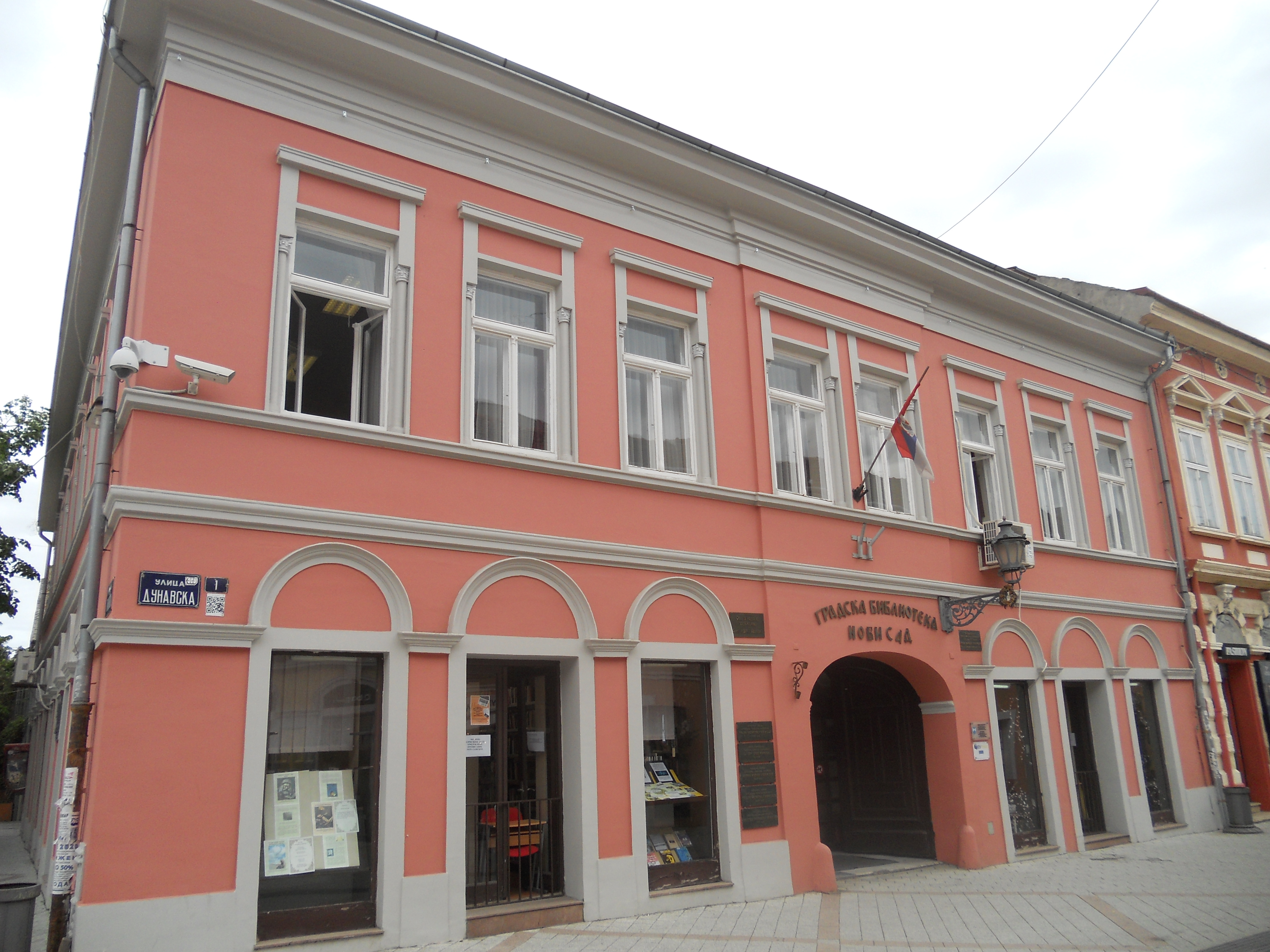 Dunavska (Novi Sad)